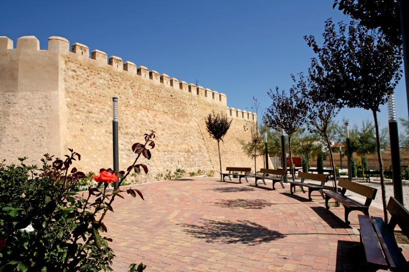 Fachada y jardín del Castillo de Caudete